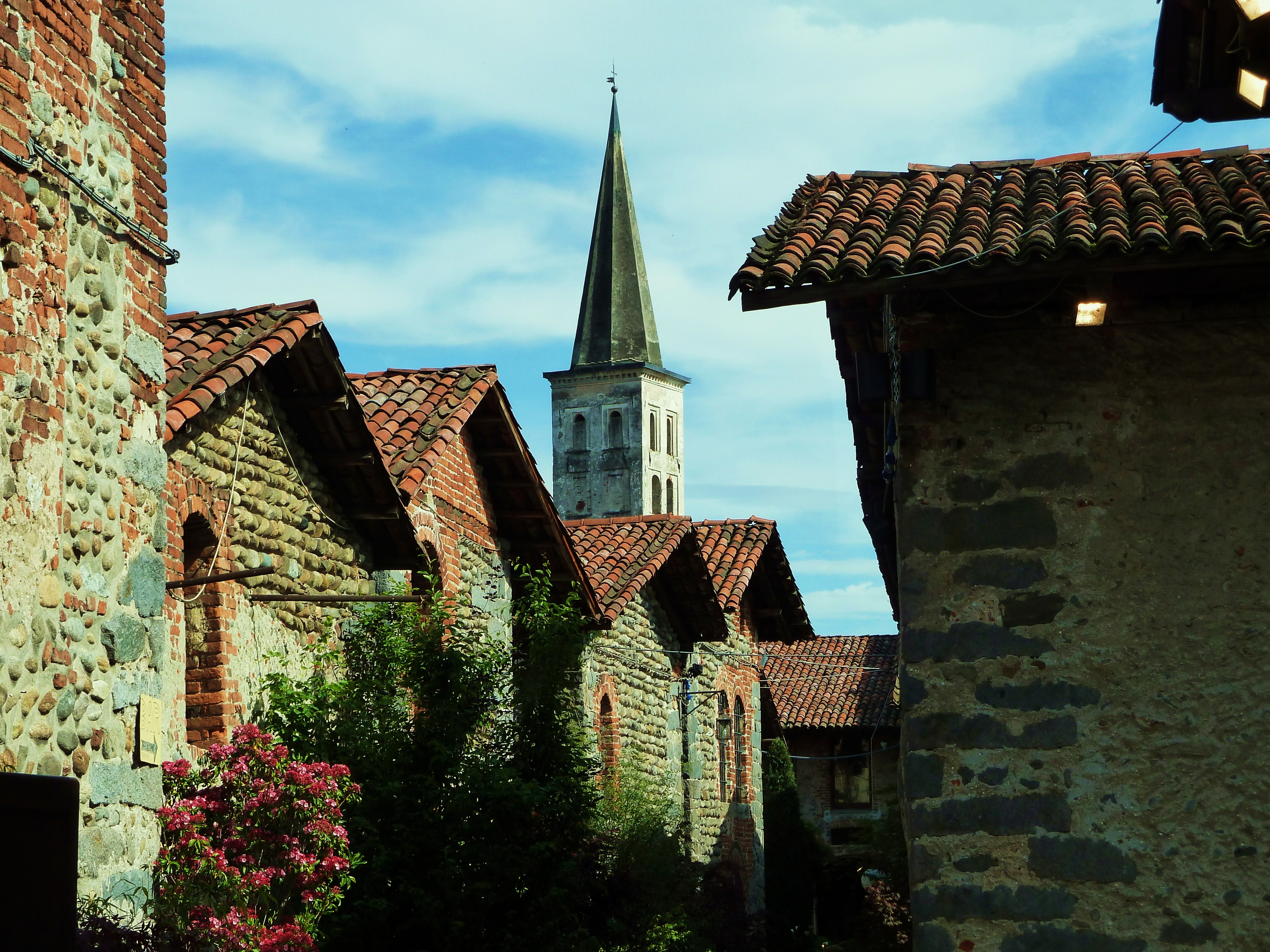 Ricetto medievale di Candelo (spazi esterni dentro e fuori le mura) This is a photo of a monument which is part of cultural heritage of Italy.